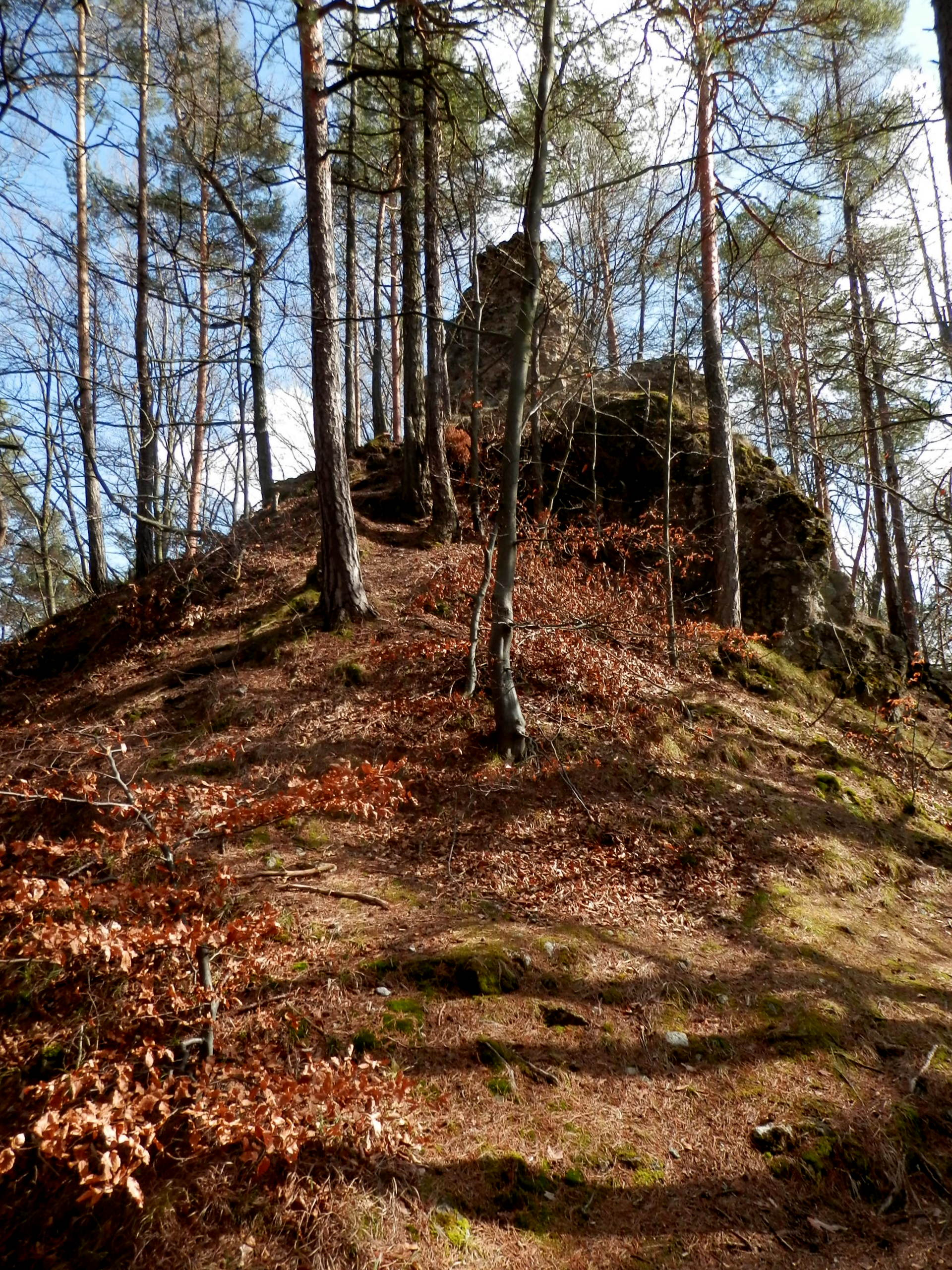 Hradné bralo so zvyškami ruín, sa nachádza v lese, západne od obce Lipovce. Miestny názov Zámčisko (618m.n.m), Jazvečia hora alebo aj Varhoška. Prvá písomná zmienka o hrade pochádza z roku 1262.